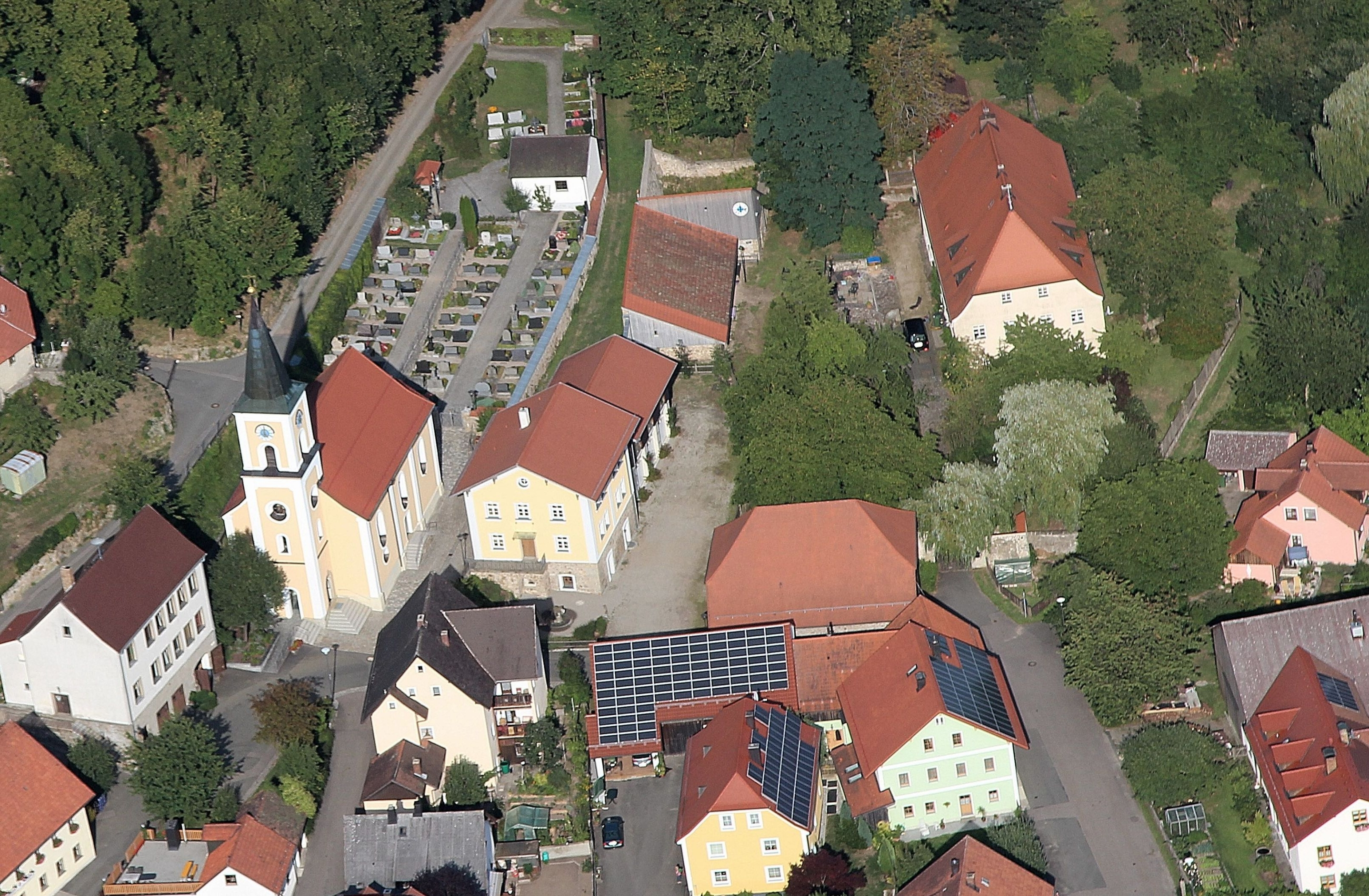 Pfarrkirche St. Johannes der Täufer in Thanstein, Landkreis Schwandorf, Oberpfalz, Bayern